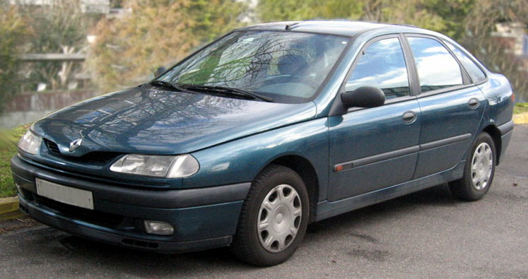 Renault Laguna I Own picture